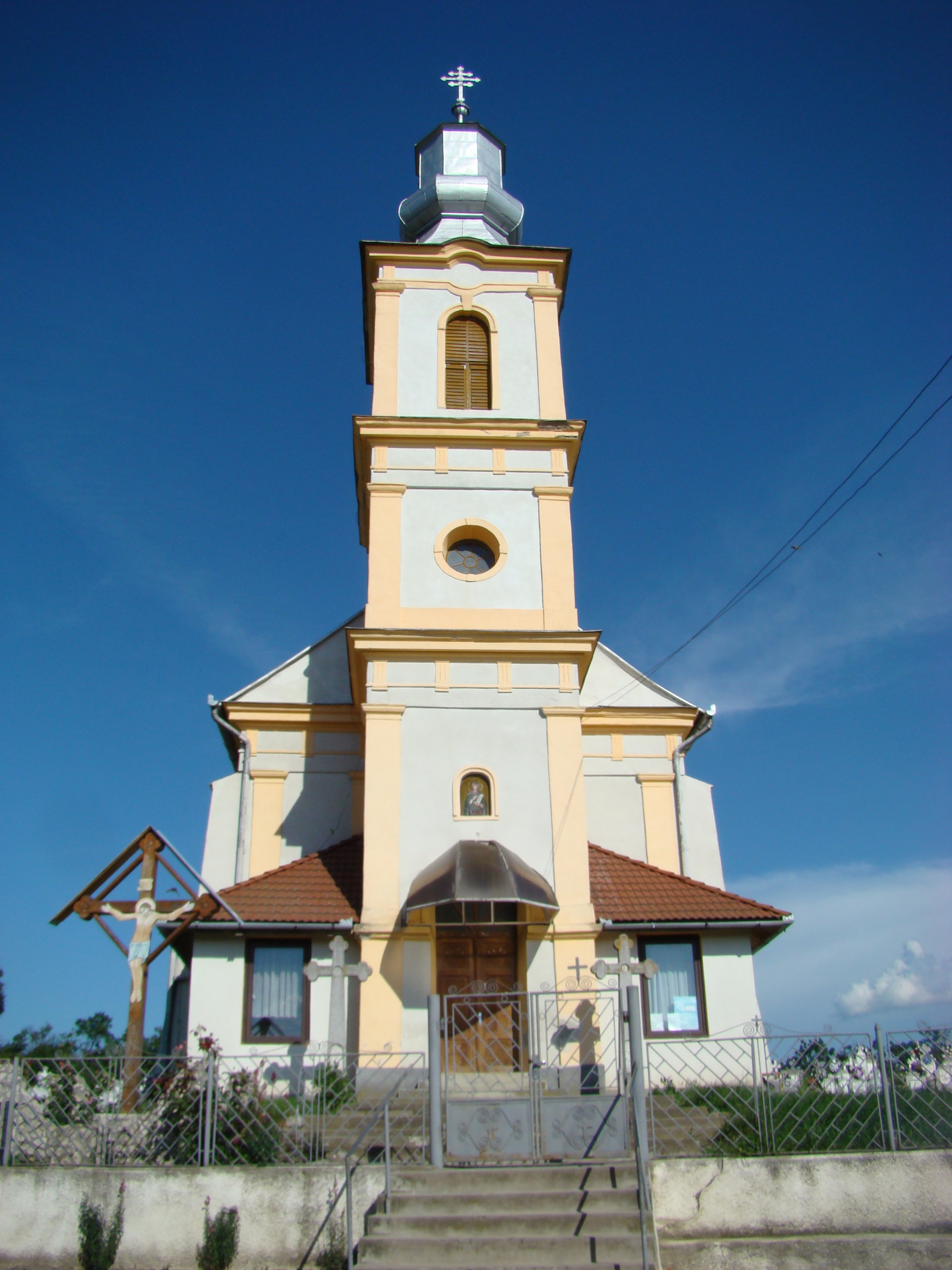 Biserica ortodoxă „Cuvioasa Paraschiva” din Bucerdea Grânoasă, județul Alba